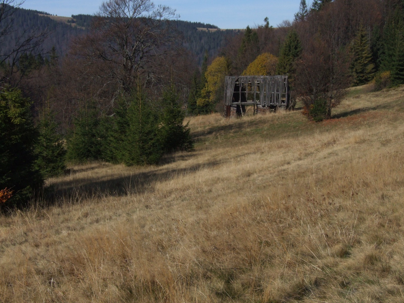 Szałas na polanie Jankówki w Gorcach